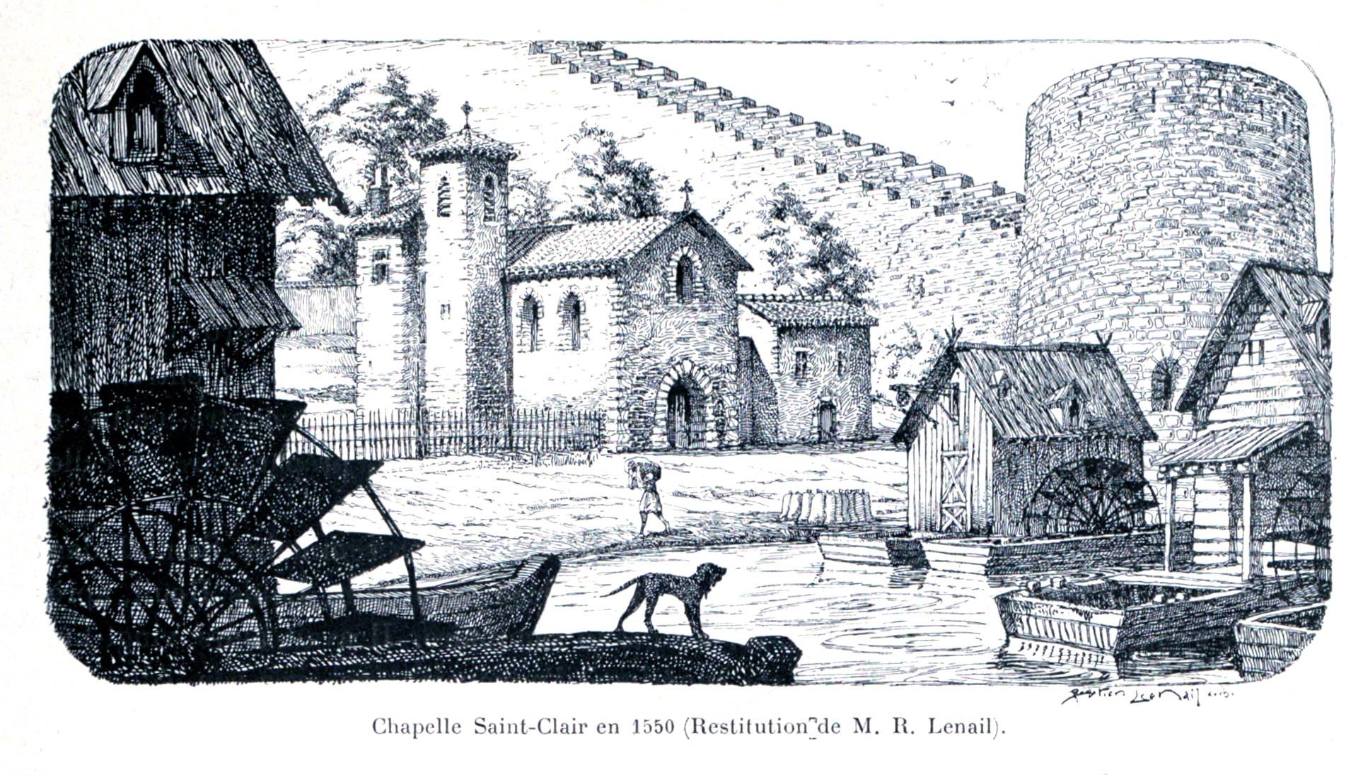 Illustration pour l'Histoire des églises et chapelles de Lyon